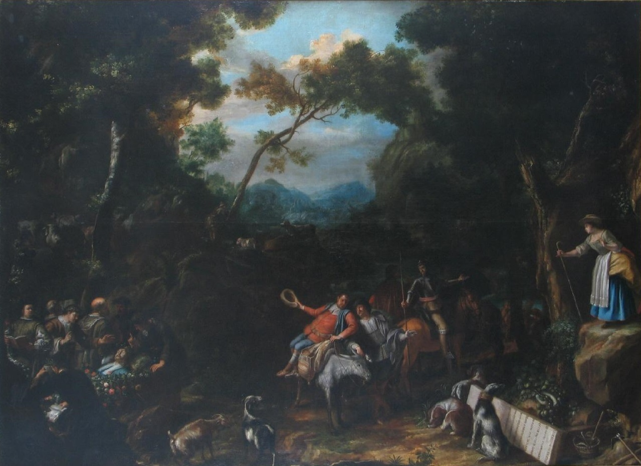 La obra representa una escena de la obra Don Quijote de la Mancha, que fue escrita por Miguel de Cervantes Saavedra en 1605.